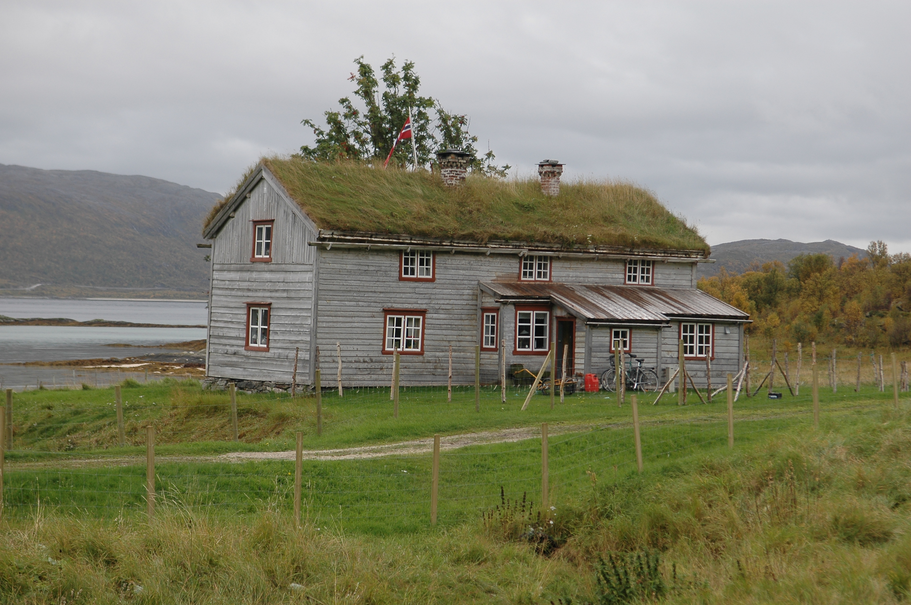 Nerstua. September 2011.